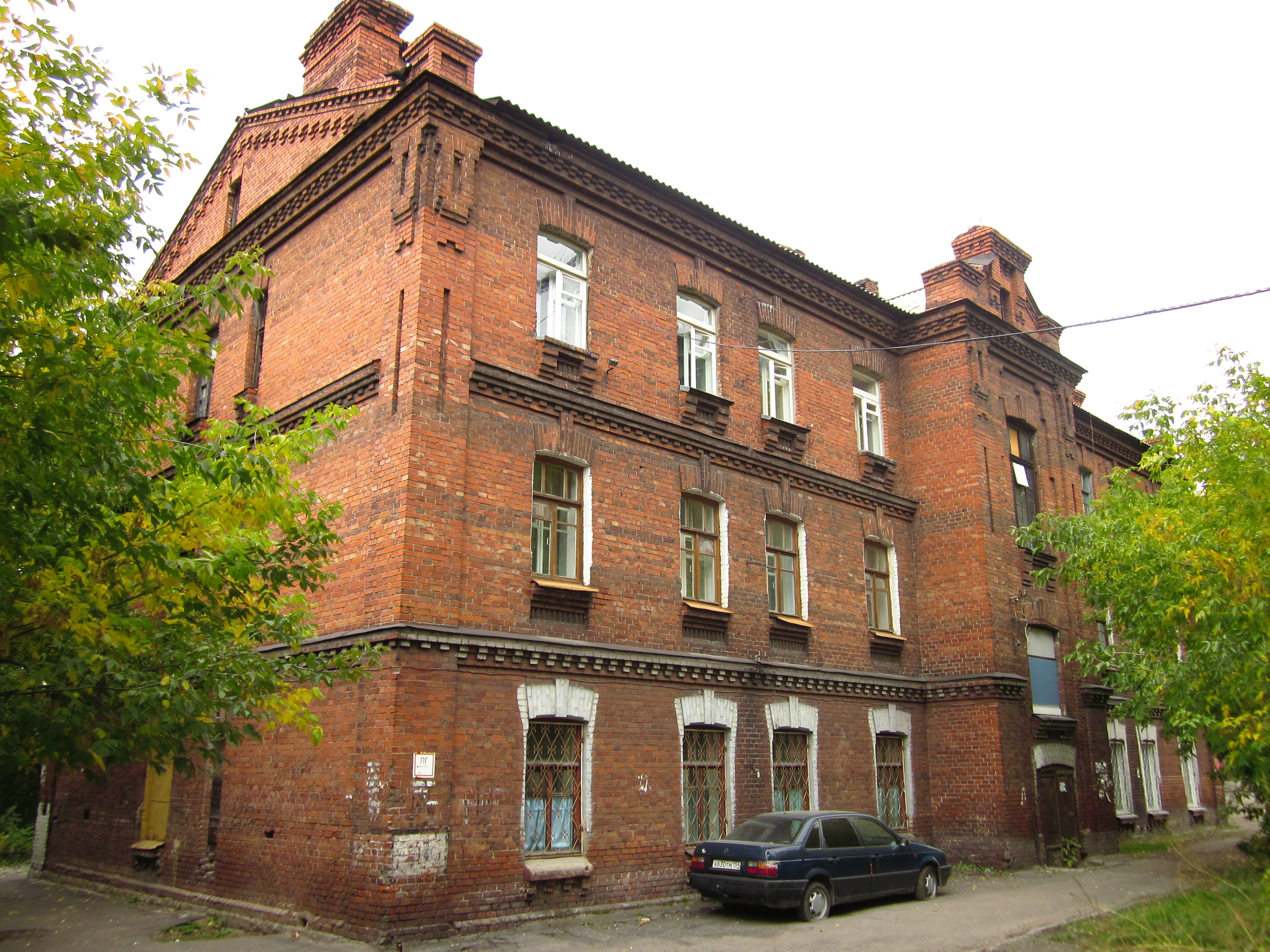 Дом для 12 бессемейных младших офицеров Тополёвая, 2. Построен в 1910 - 1913 гг.